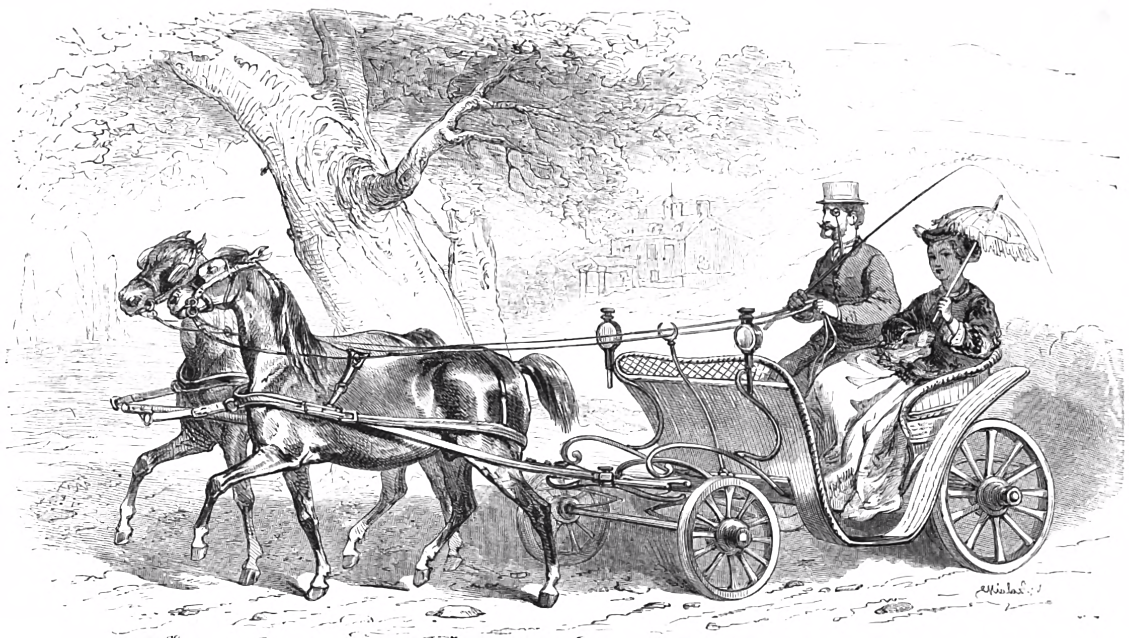 Planche XXXIV, chevaux normands, dans Etudes sur l'exposition de 1867